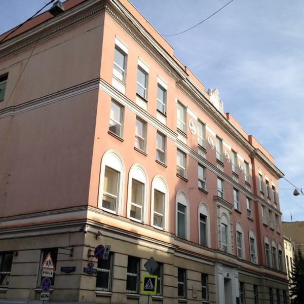 Здание гимназии в Леонтьевском